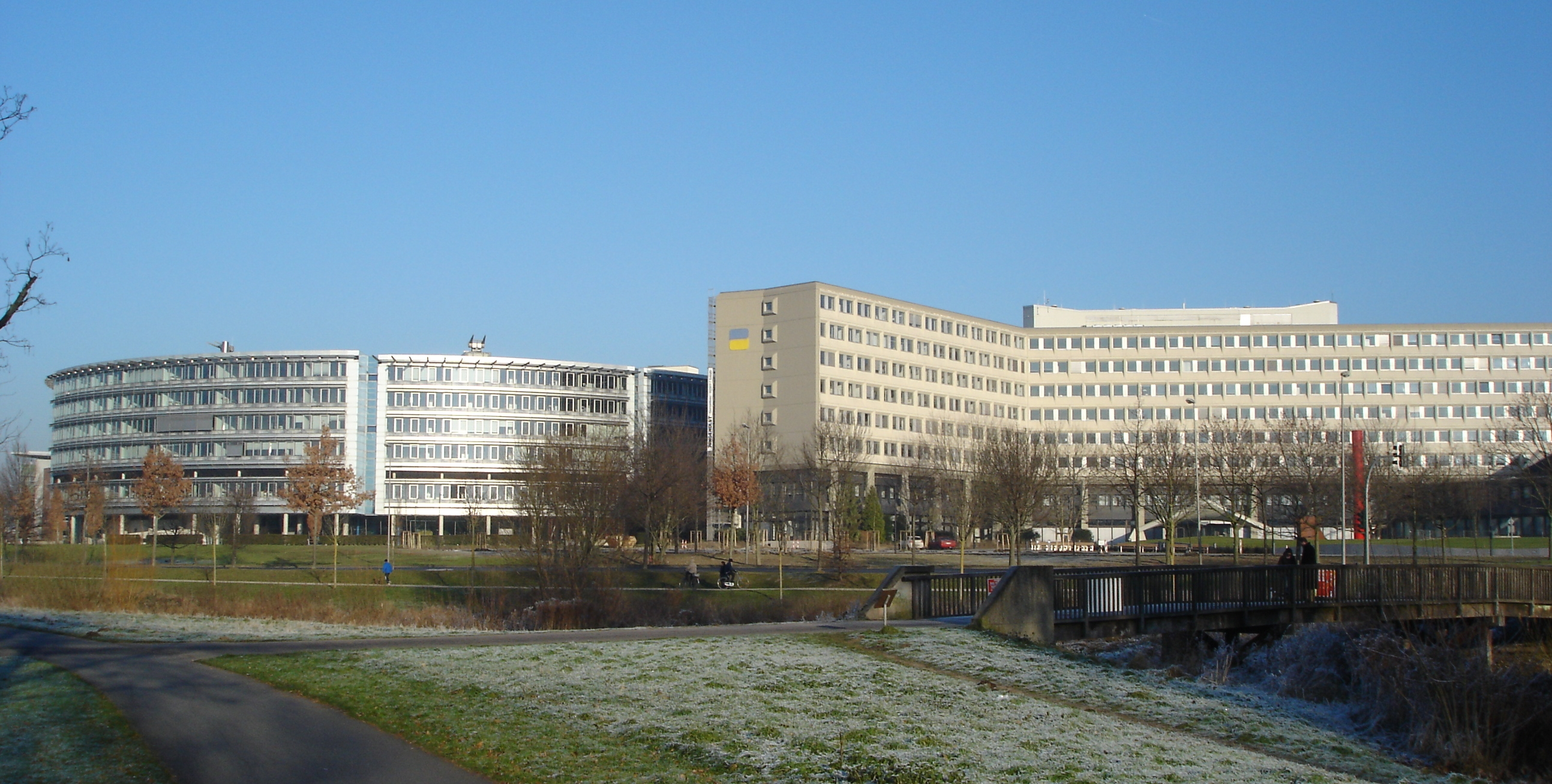 Office building of Deutsche Rentenversicherung Westfalen in Münster, Westphalia, Germany